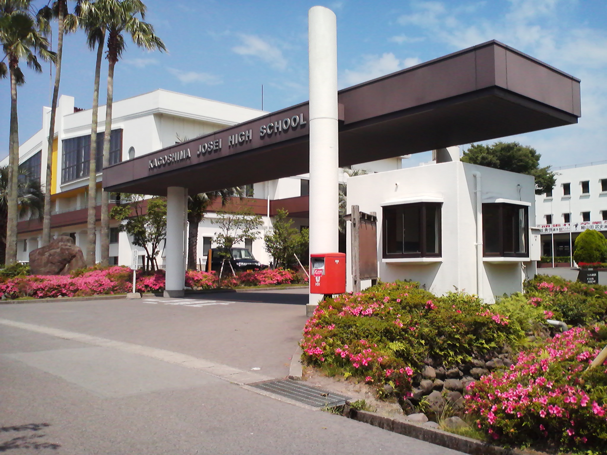 鹿児島城西高等学校の外観